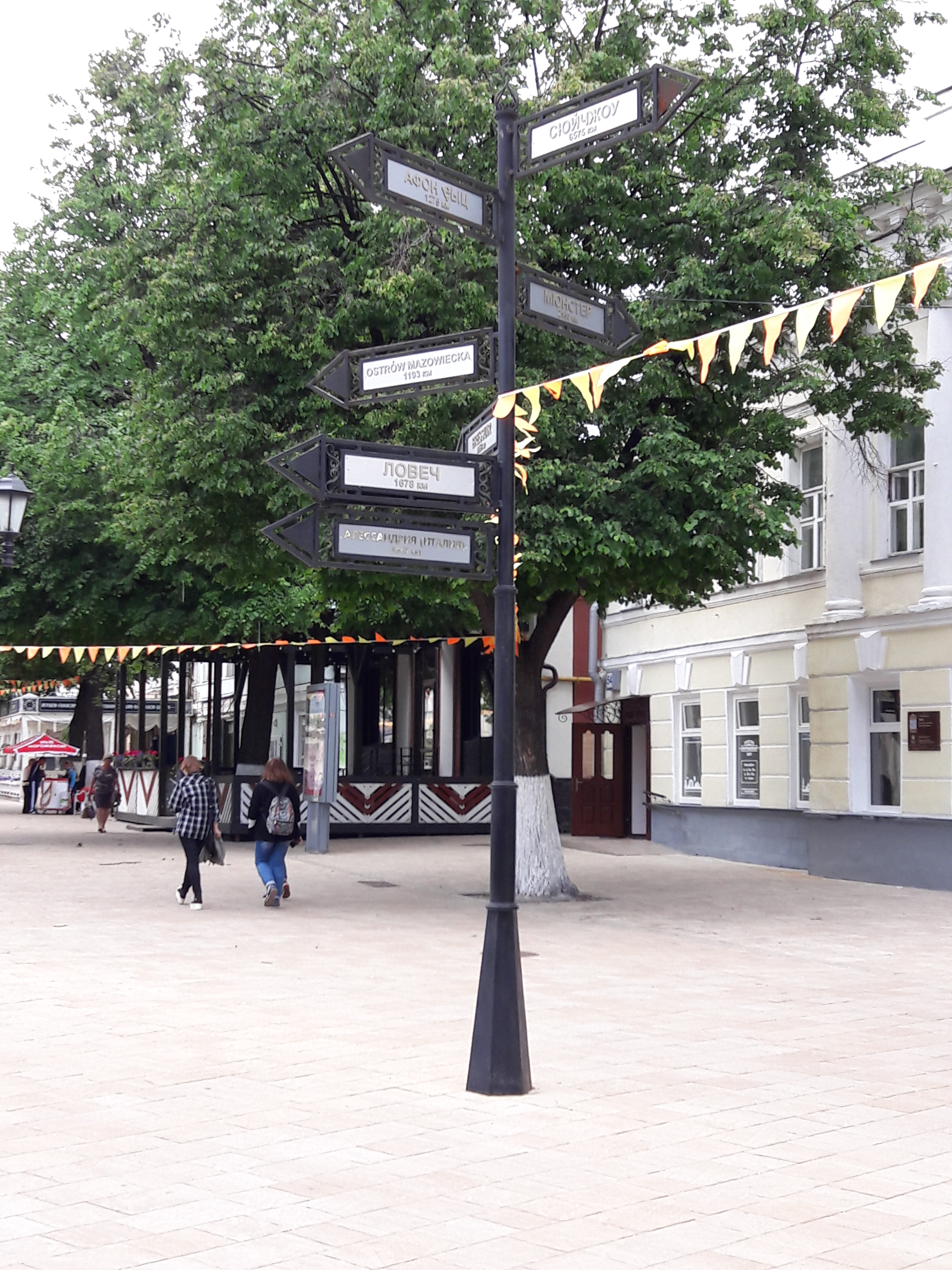 Указатель на города-побратимы Рязани